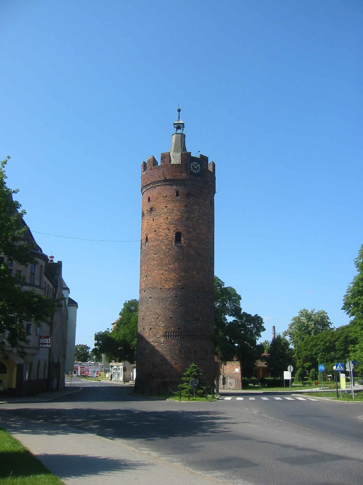 Gubin - baszta Bramy Ostrowskiej w zespole murów miejskich